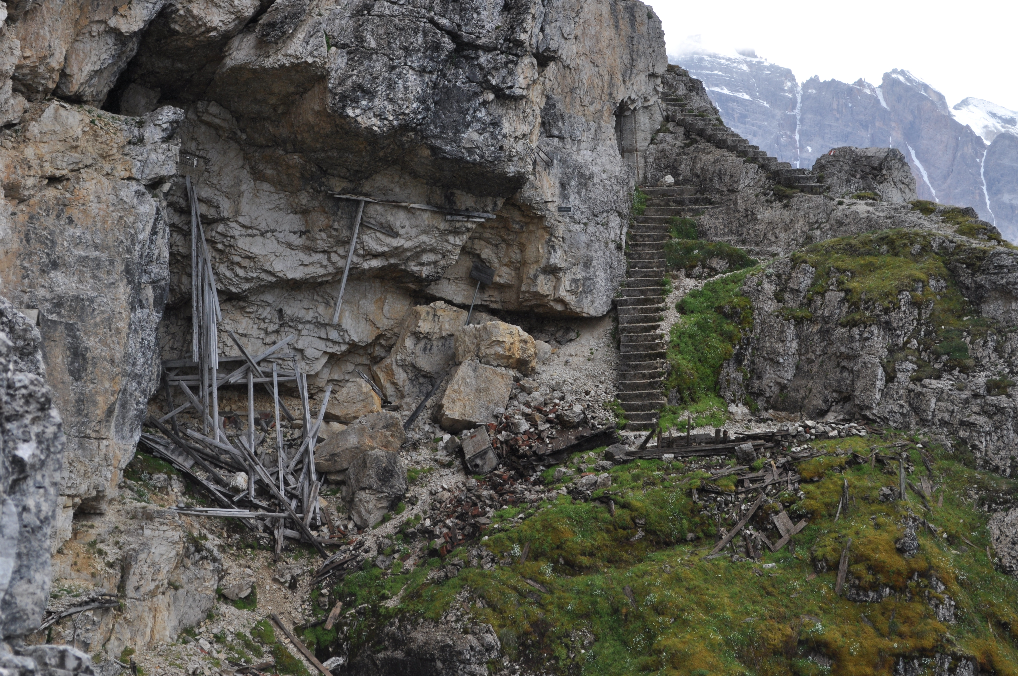 Utente Riotforlife, opera propria, scattata su Monte Piana il 31-07-2010